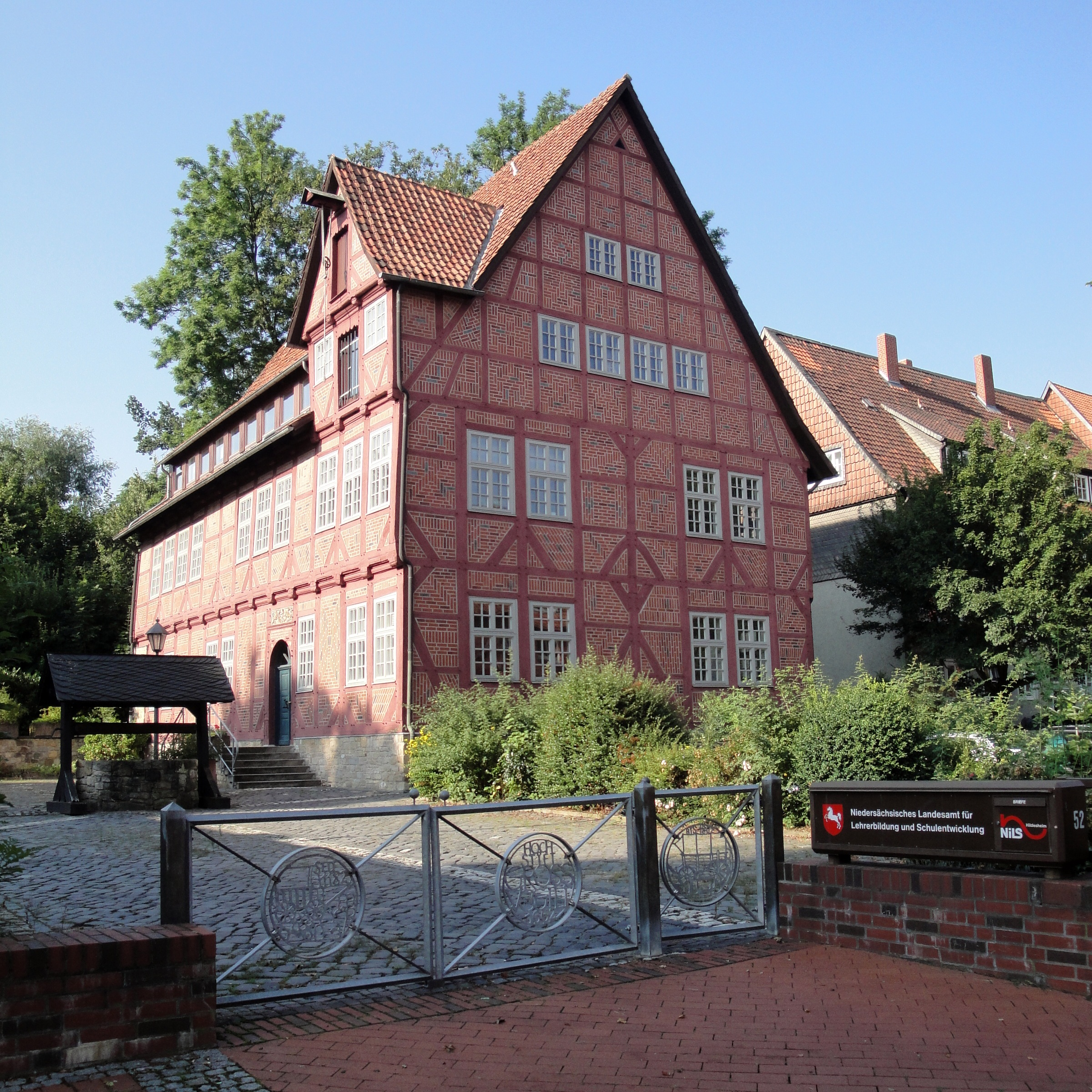 Großvogtei, Niedersächsisches Landesamt für Lehrerbildung und Schulentwicklung, Niedersächsischen Landesinstituts für schulische Qualitätsentwicklung (NLQ), Hildesheim